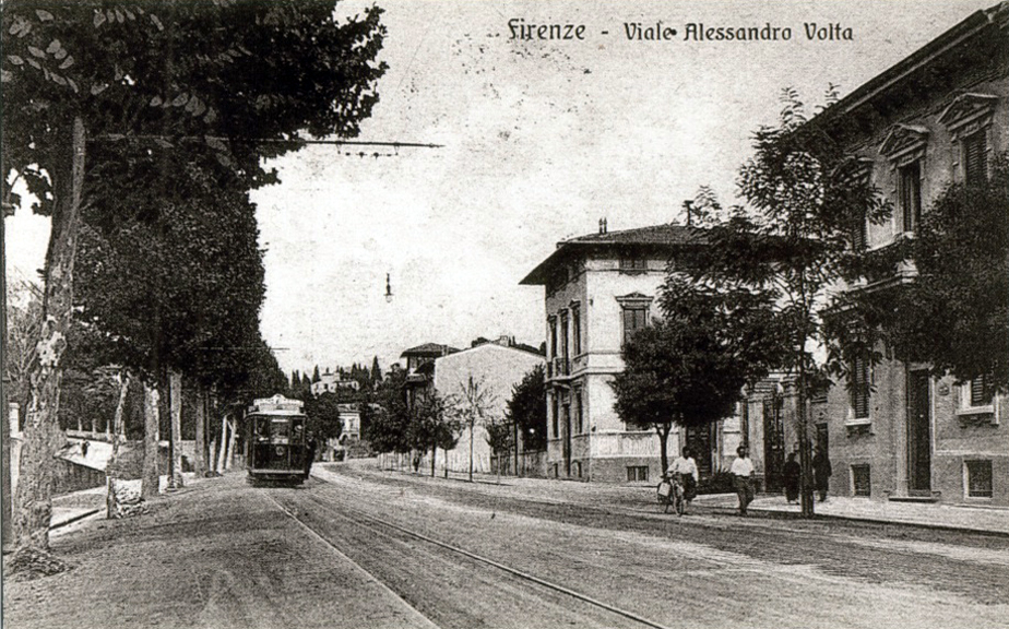 Vettura in uso sulla Tranvia Firenze-Fiesole ripresa all'altezza del viale Volta a Firenze